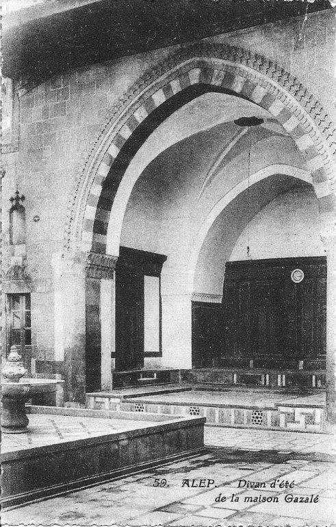 Divan D'été de la maison Gazalé - Alep - Bretocq 1918-1922